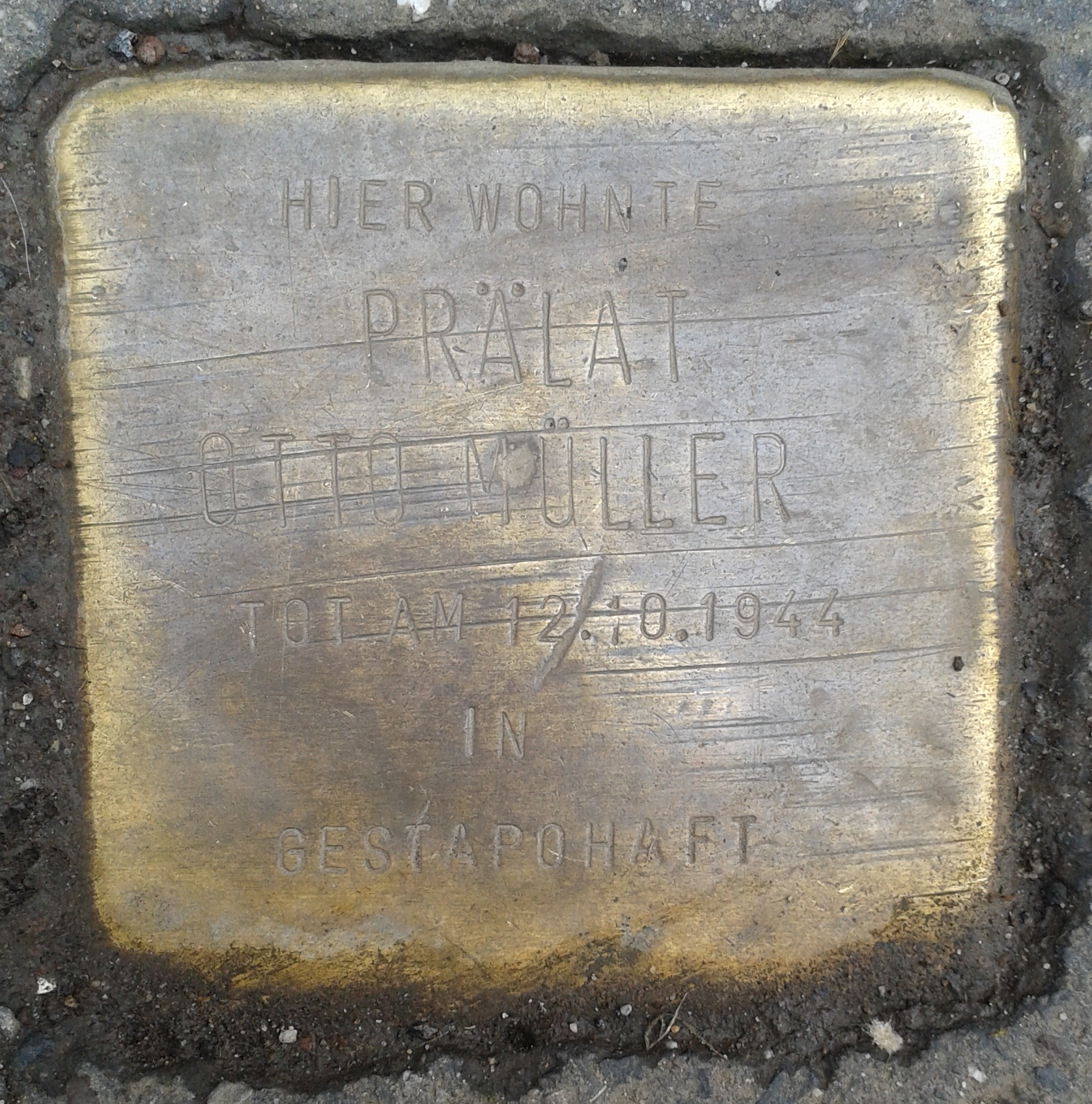 Stolperstein Köln Bernhard-Letterhaus-Straße 26 Prälat Otto Müller